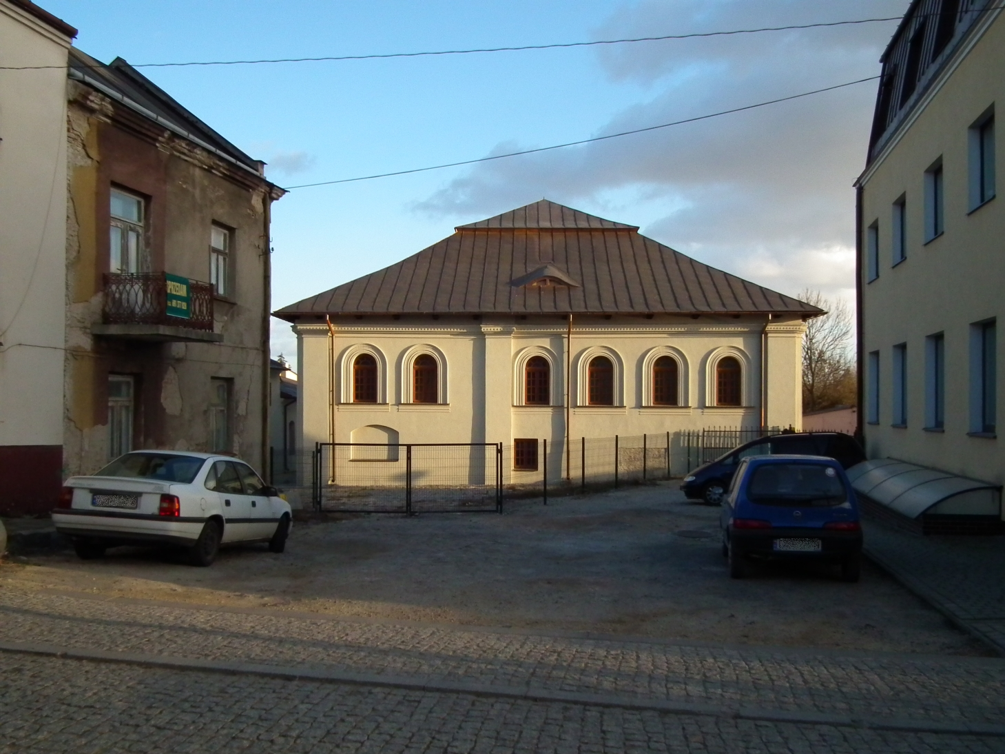 BóżnicaDom kahalny (d. bóżnica) ul. Bóżnicza 6, 6a, miasto Kraśnik 12.1971.